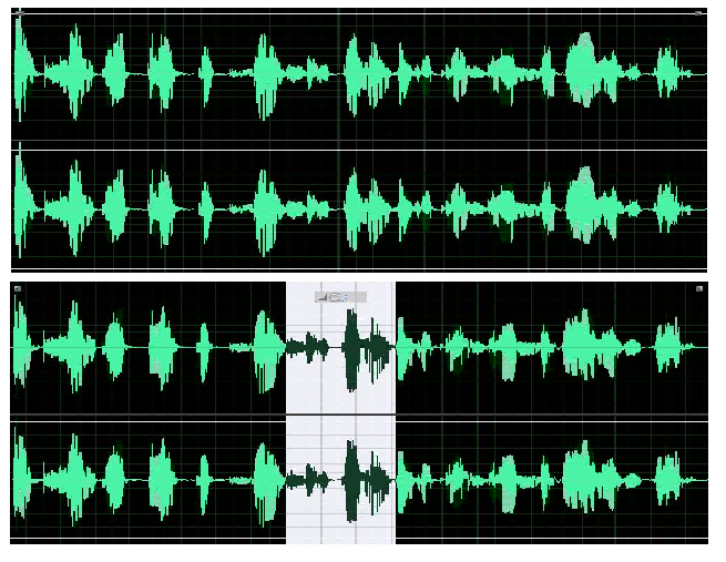 Obra propia estudiant UPC